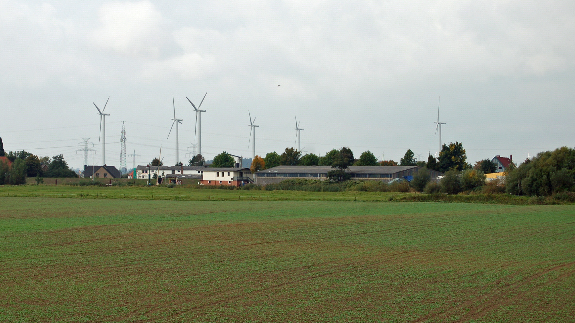 Der Windpark von Uetersen, von Moorrege aus gesehen